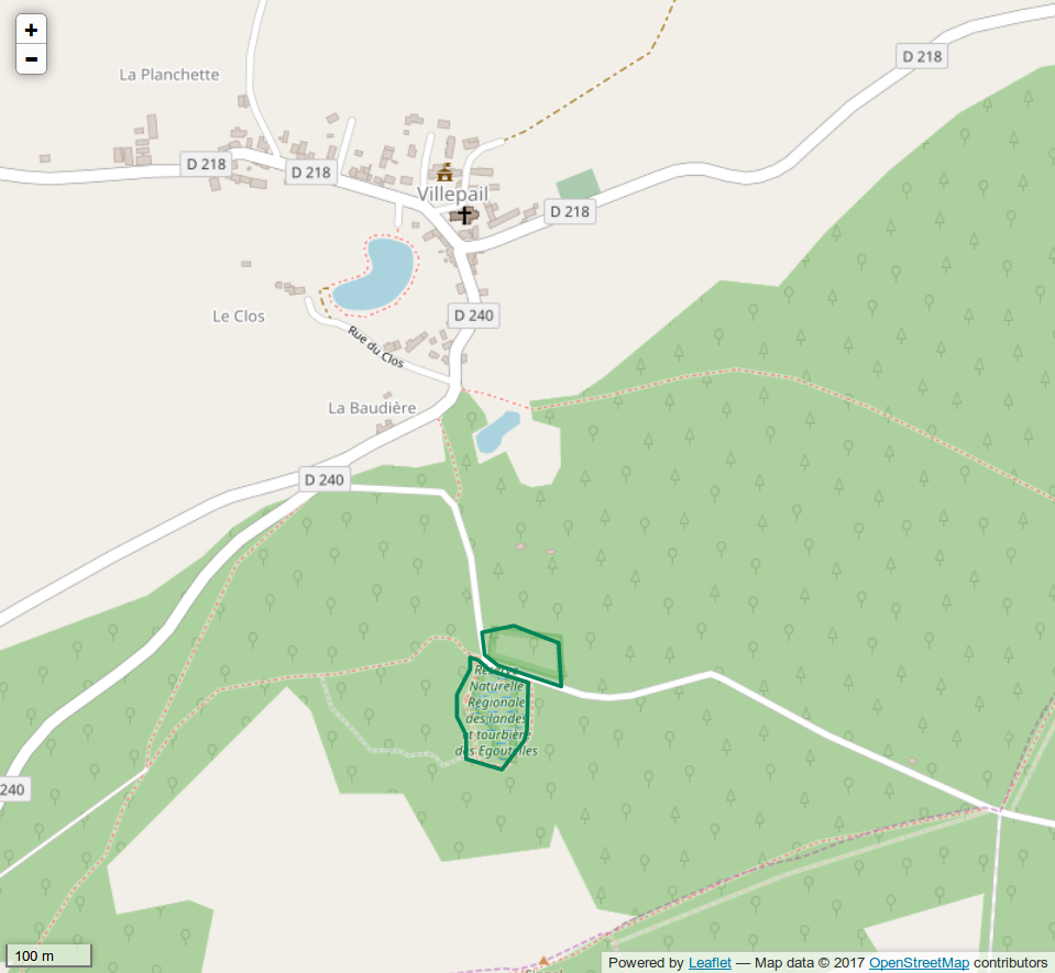 Périmètre de la RNR des Landes et tourbiére des Egoutelles